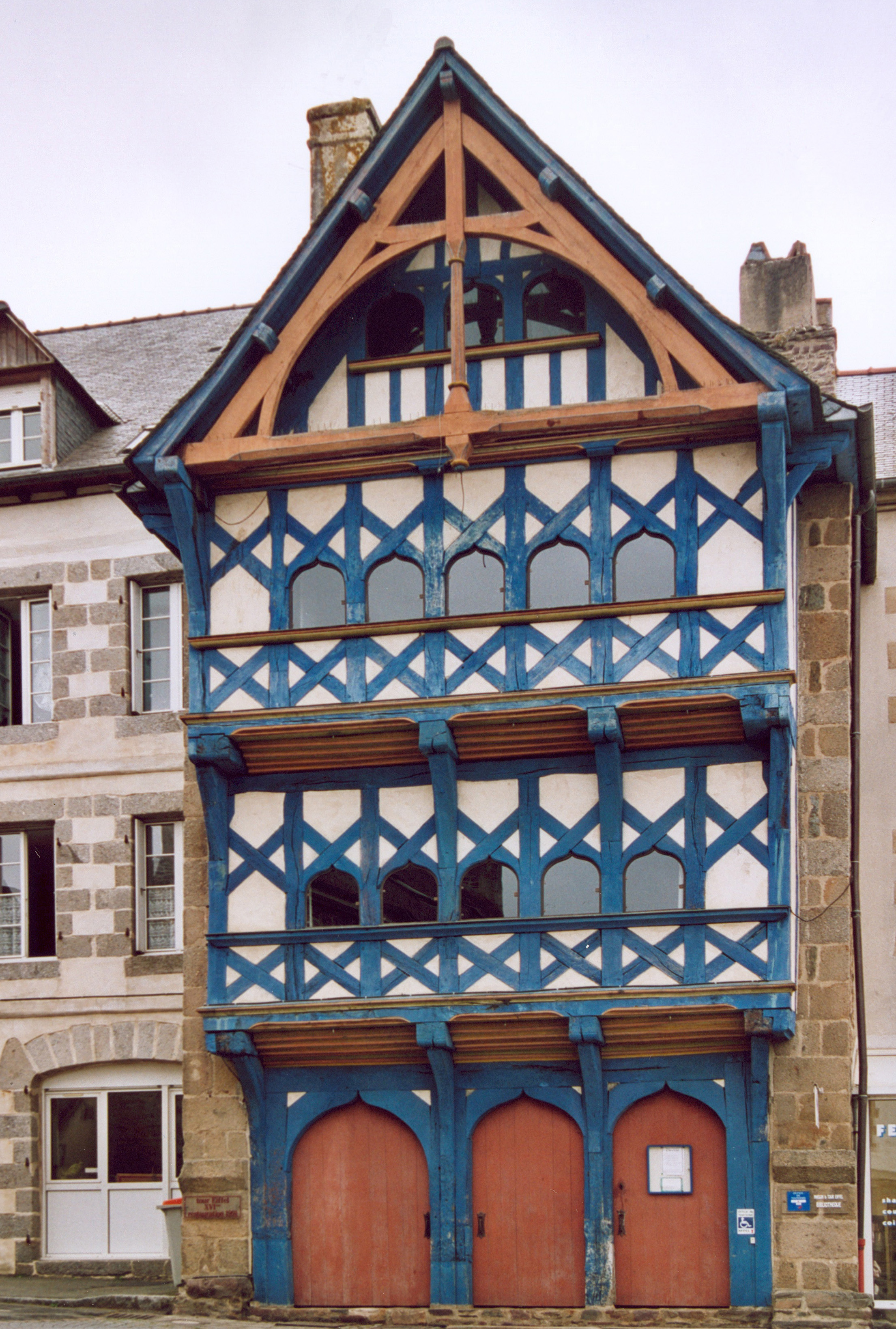 France Bretagne Côtes d'Armor Maison de la Tour Eiffel à Pontrieux Photographie prise par GIRAUD Patrick